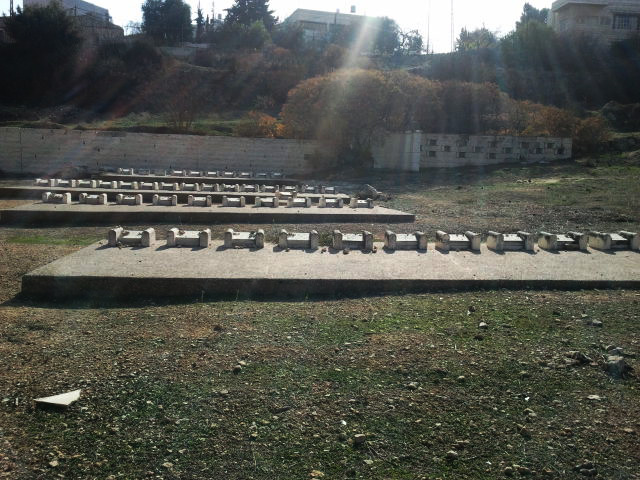 חלקת "קדושי תרפ"ט" בבית העלמין העתיק בחברון